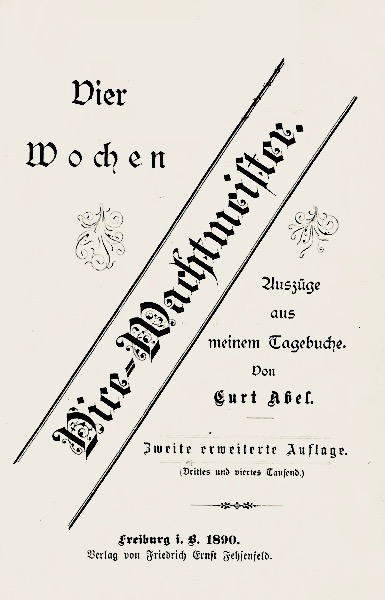 Curt Abel: Vier weeken Vice Wachtmeister, Uitgeverij Friedrich Ernst Fehsenfeld, Freiburg im Breisgau 1890.